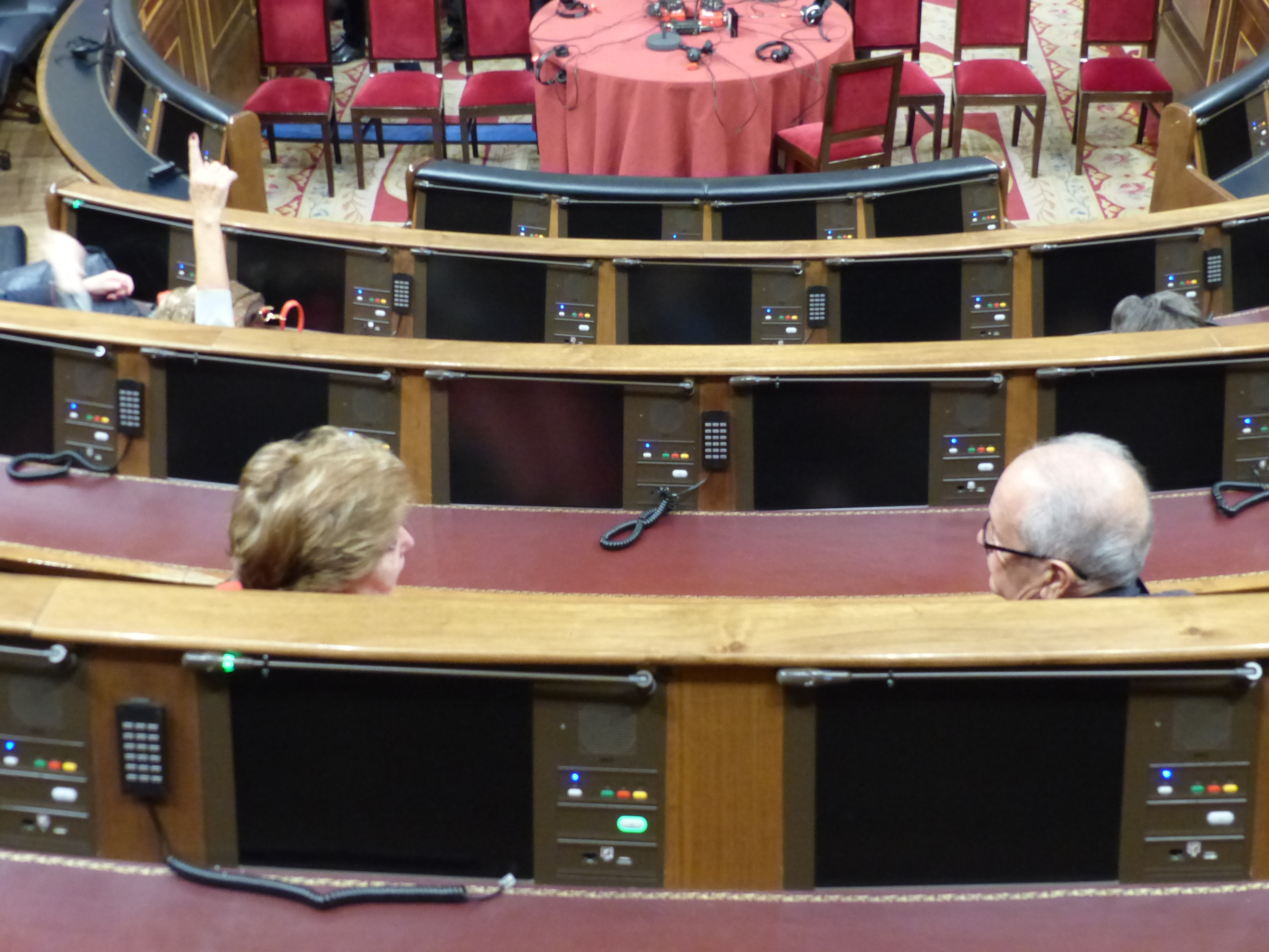 Congreso de los diputados, asientos de los diputados